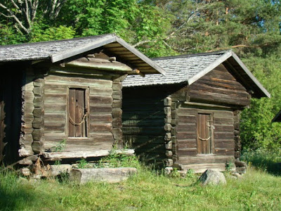 Aittoja